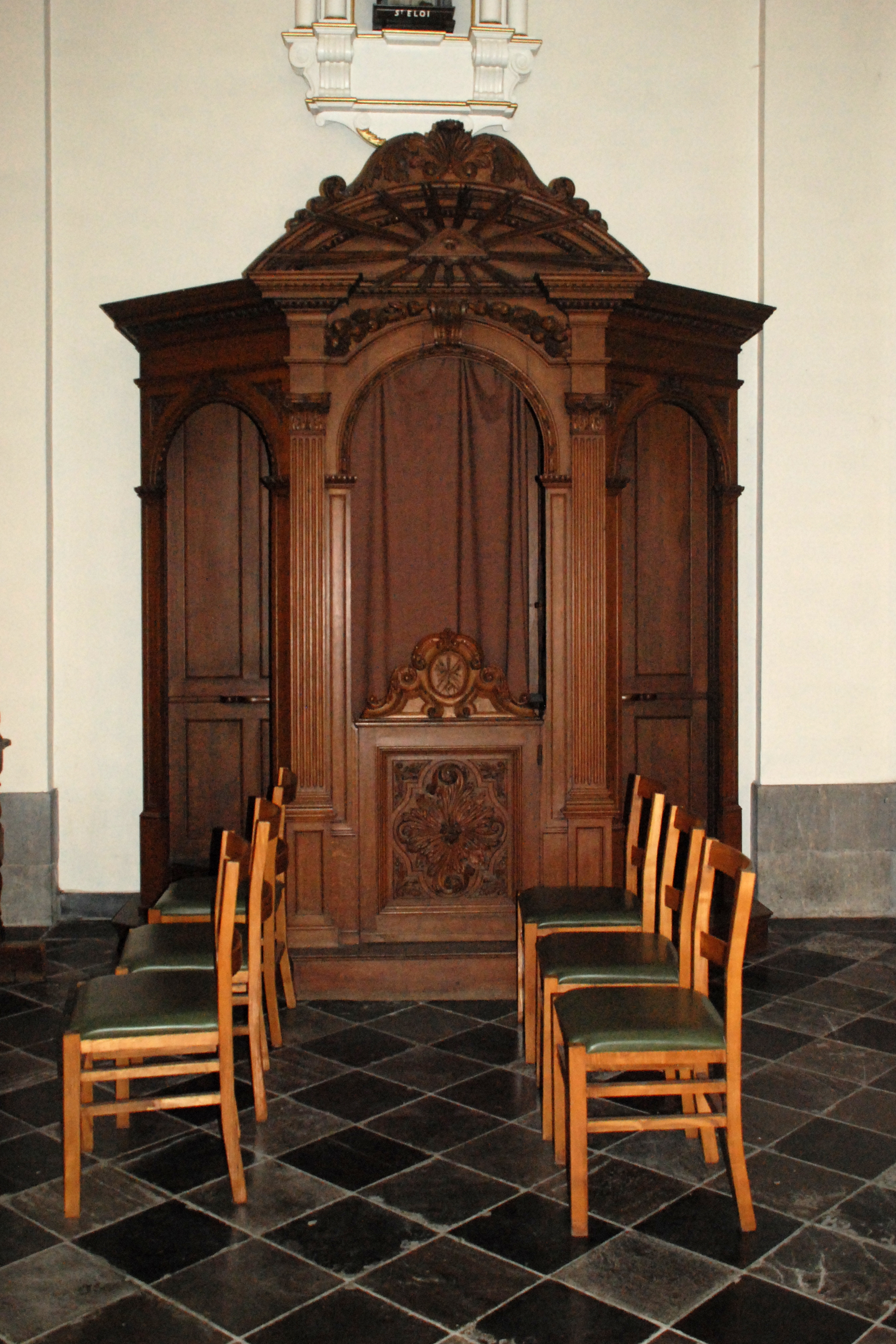 Belgique - Province de Namur - Viroinval - Nismes - église Saint-Lambert (1829)